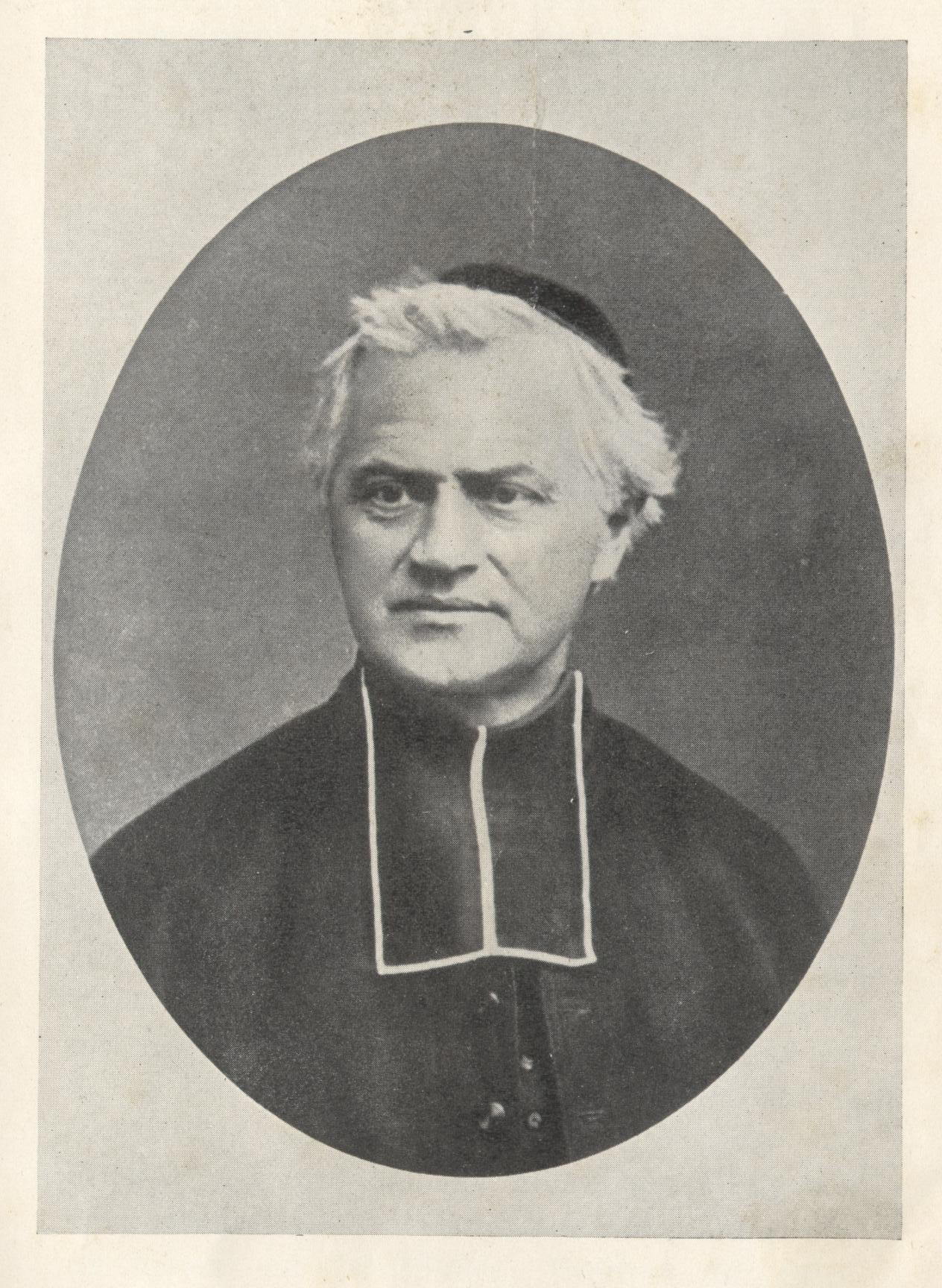 Pfarrer Joseph Guerber, Straßburg, Elsass, Reichstagsabgeordneter in Berlin, Publizist, Buchautor, Historiker